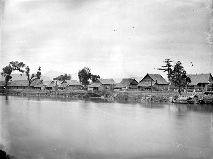 Negatief. Kampement langs het water, Pankajene, Sulawesi